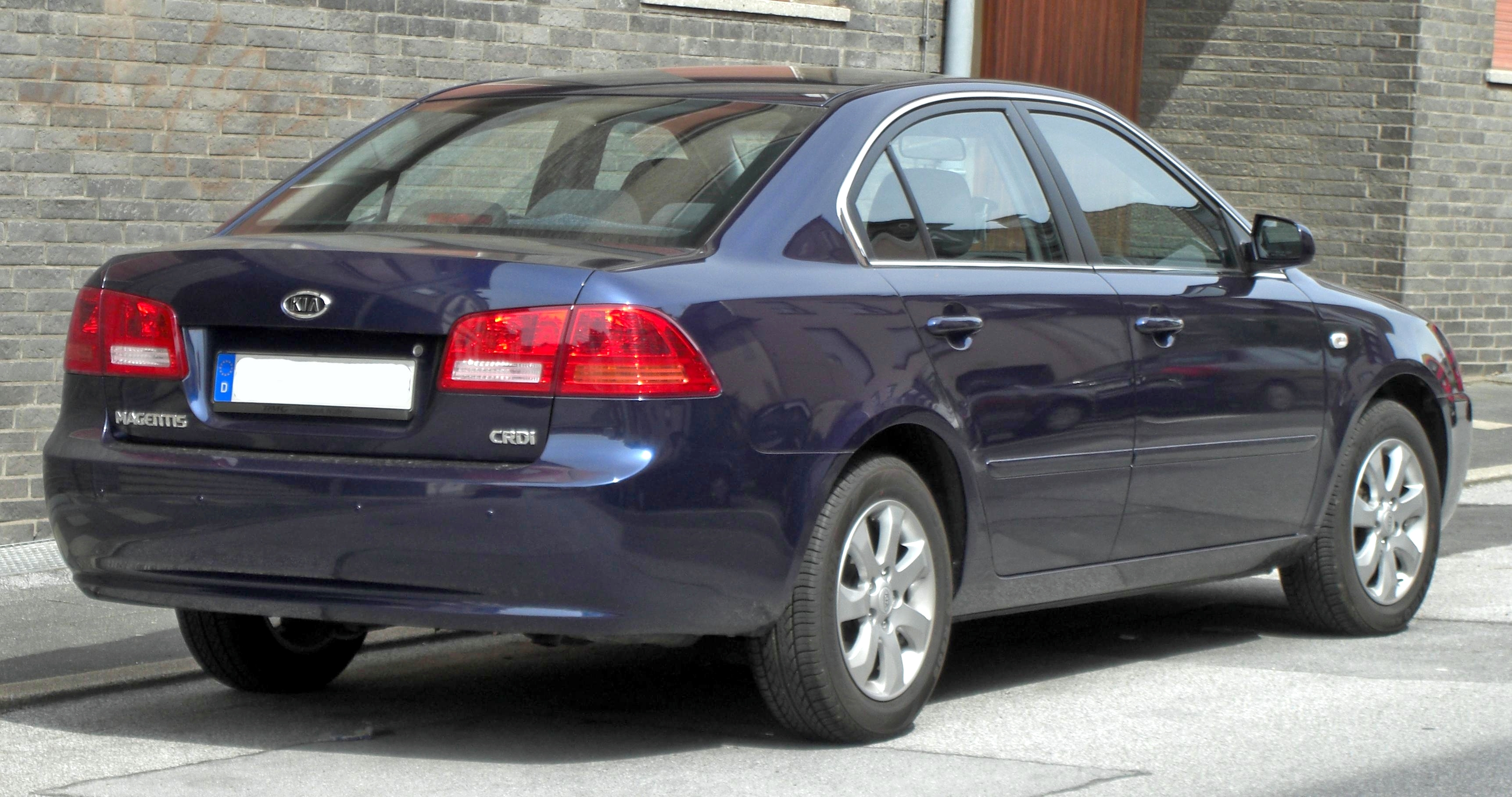 Kia Magentis